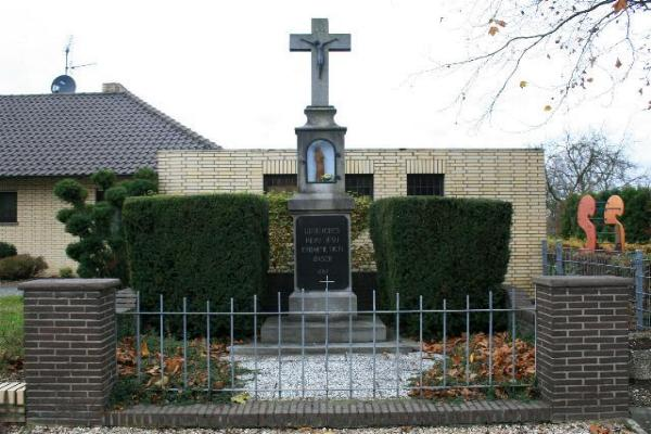 Dorfkreuz in Wegberg-Bischofshütte